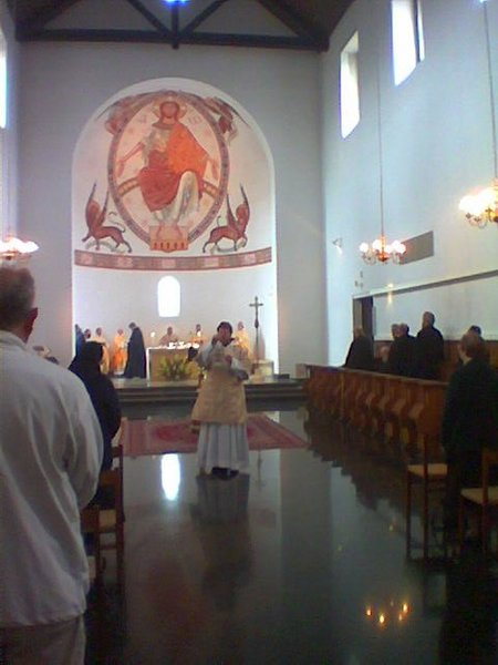 Eglijhe (båzleke) latene do Moustî d'Tchevetogne.